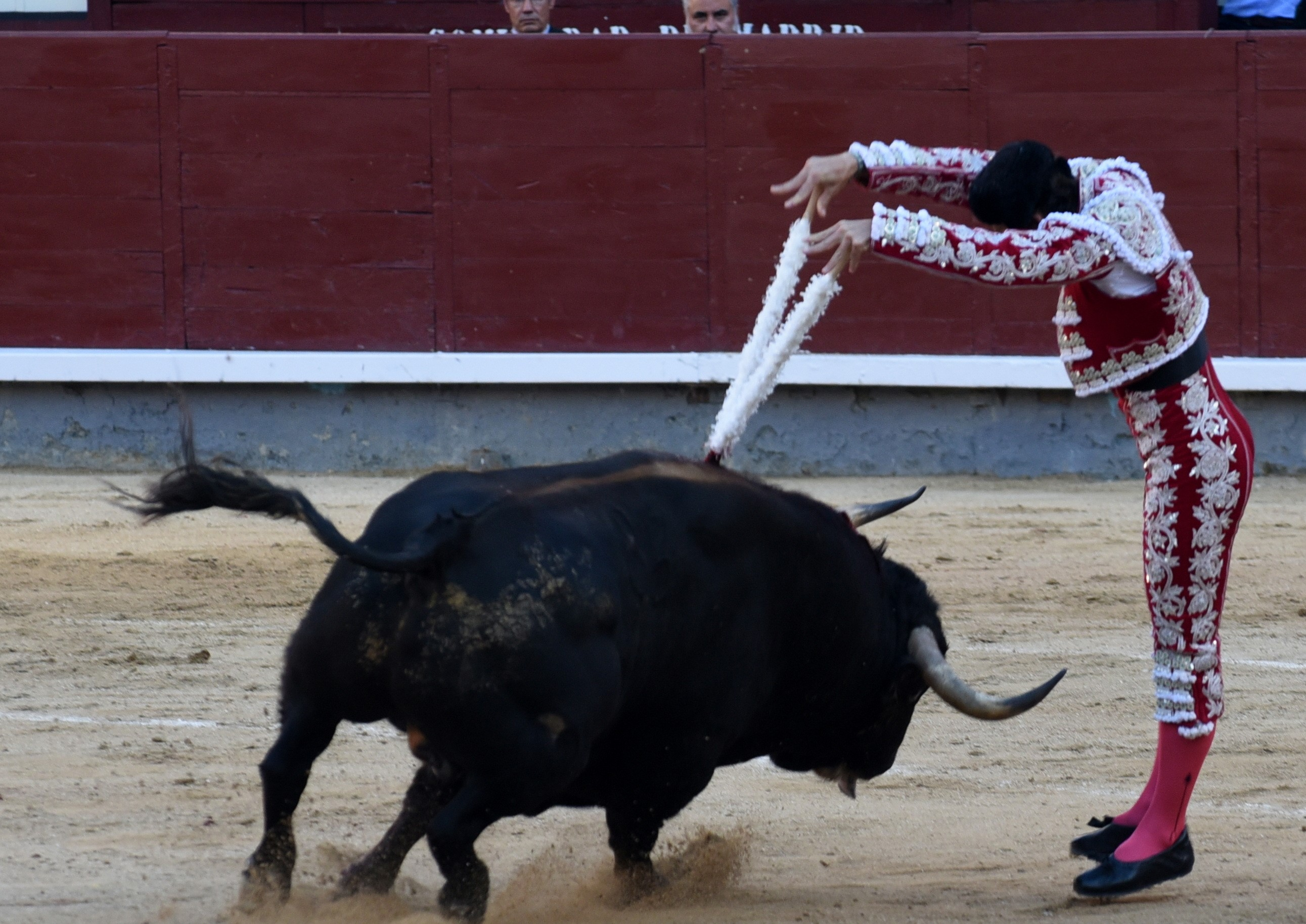 Javier Ambel clava las banderillas reunidas en la cruz, con gran exposición, aún entre los cuernos. Las manos aún empujan, pero ya sueltan.